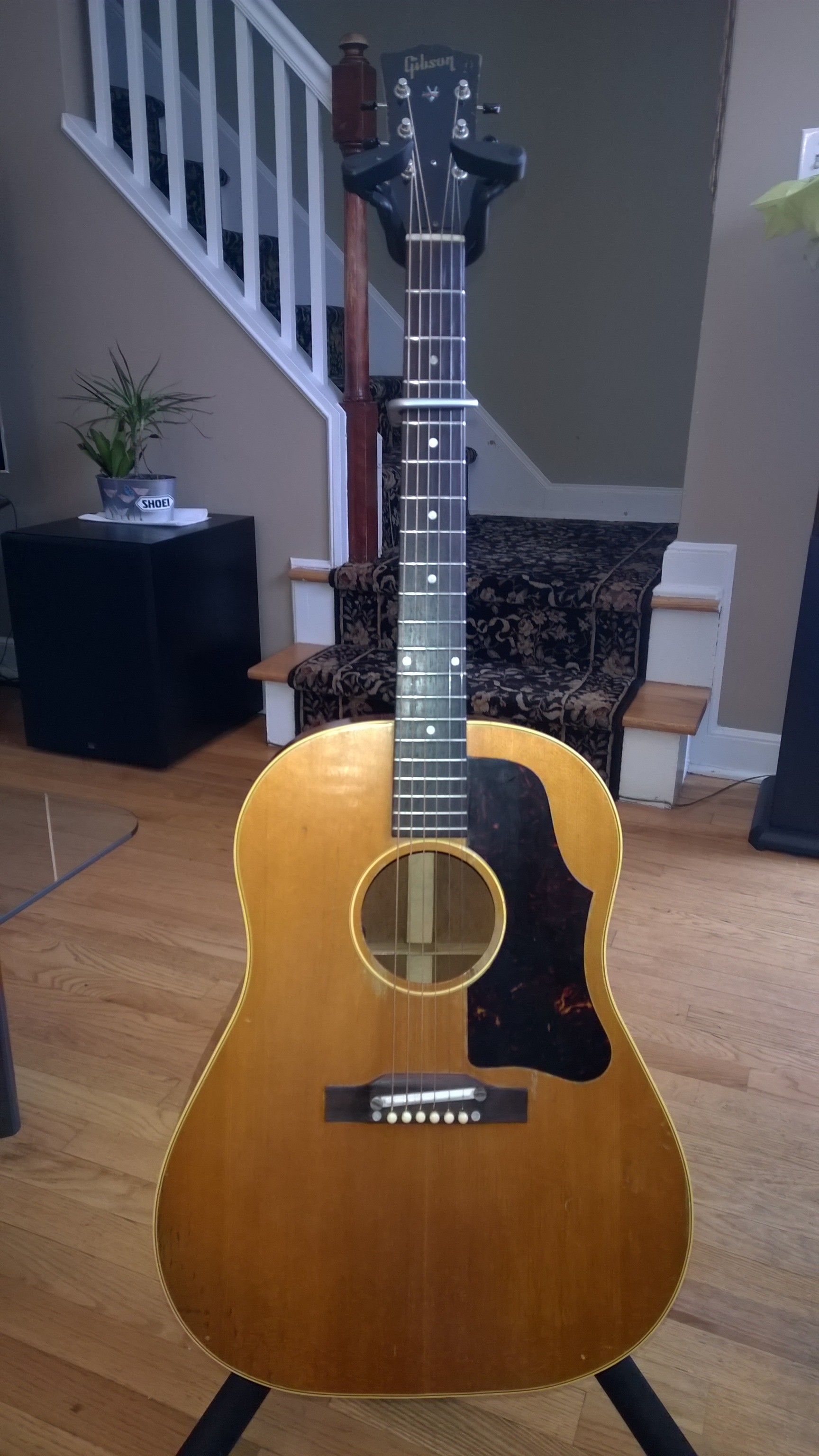 WP_20150214_014.jpg